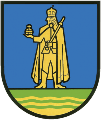 Das Hauptmotiv, die Figur des Heiligen Königs Stephan wurde deshalb ausgewählt, weil es bereits im Königsdorfer Gemeindesiegel verwendet wird. Einer Sage nach soll Kaiser Josef II. einmal durch diese Gegend gekommen sein. Bei der Überquerung des Limbaches im Bereich der alten Königsbrücke, die heute nicht mehr besteht, soll er mit seinem Wagen stecken geblieben sein. Die Bewohner Königsdorf sind sofort herbeigeeilt und haben geholfen. Als Dank dafür sei der Gemeinde die Erlaubnis erteilt worden, in ihrem Gemeindesiegel das Bild des Heiligen Königs Stephan von Ungarn zu führen.